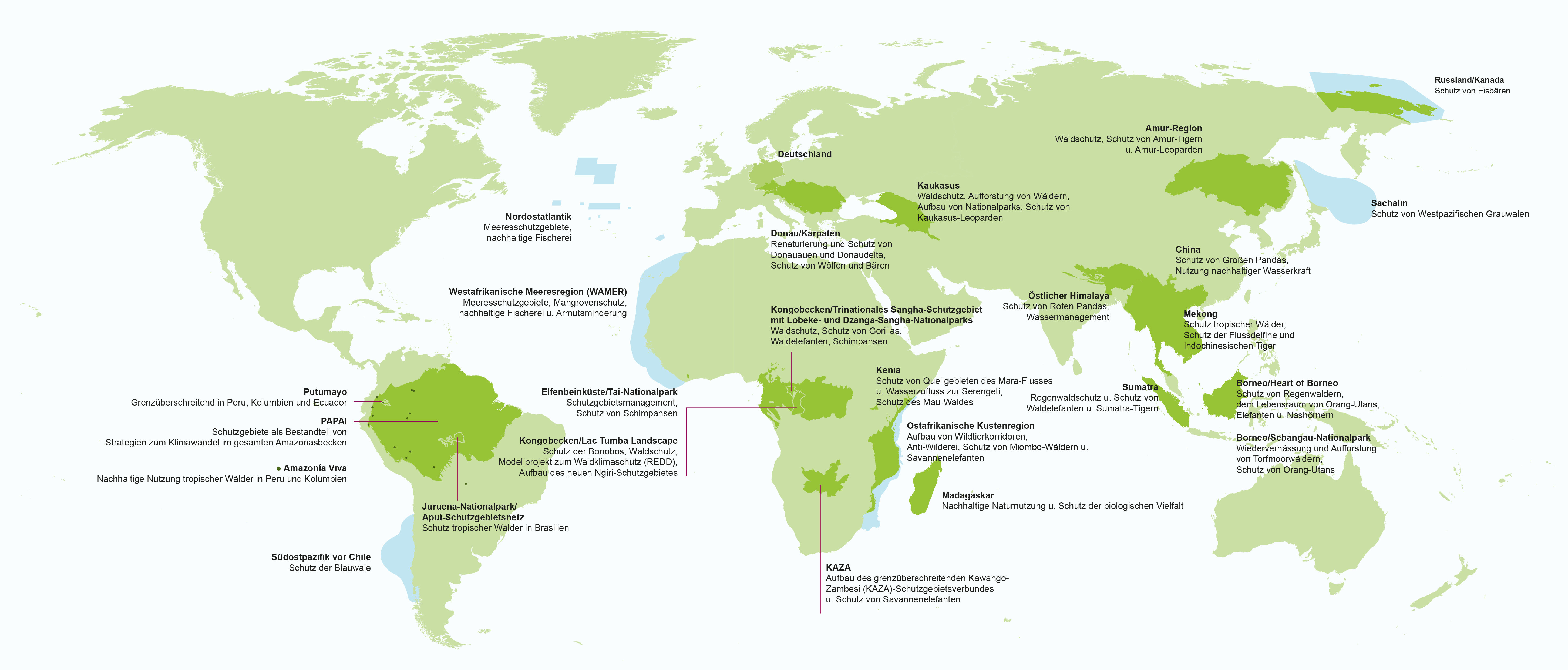 Karte der Projekte des WWF